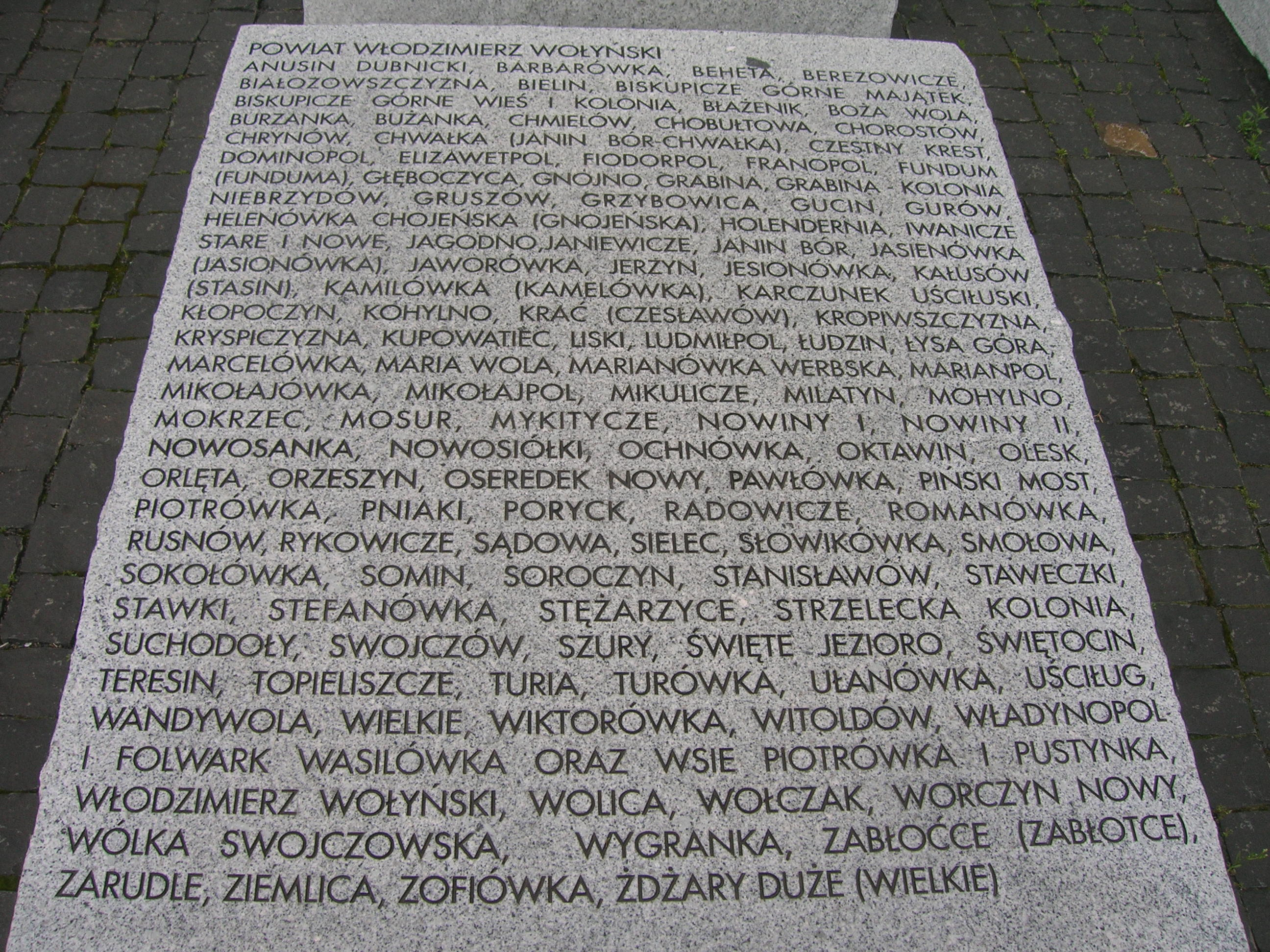 tablica powiat Włodzimierz